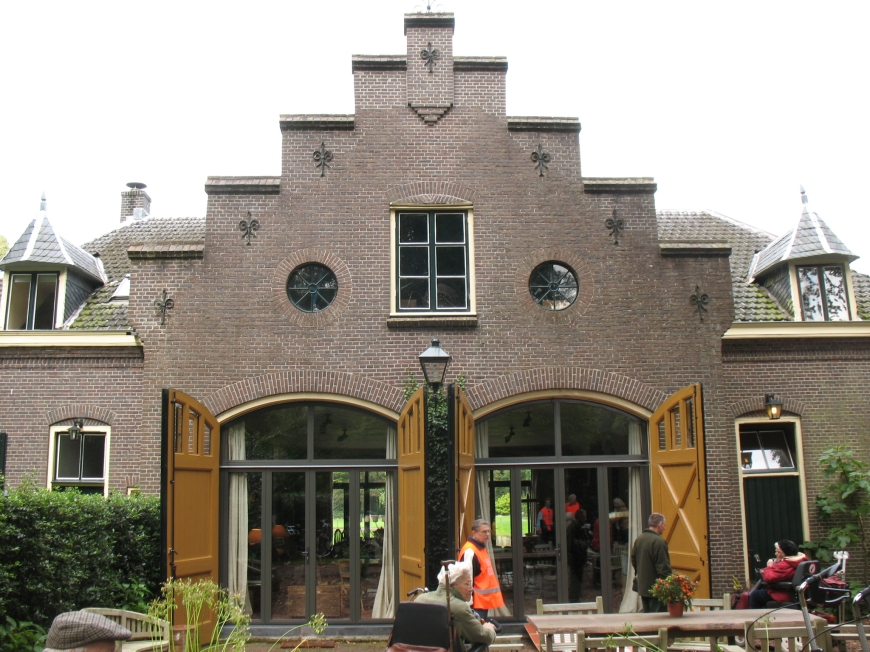 Prattenburg Koetshuis